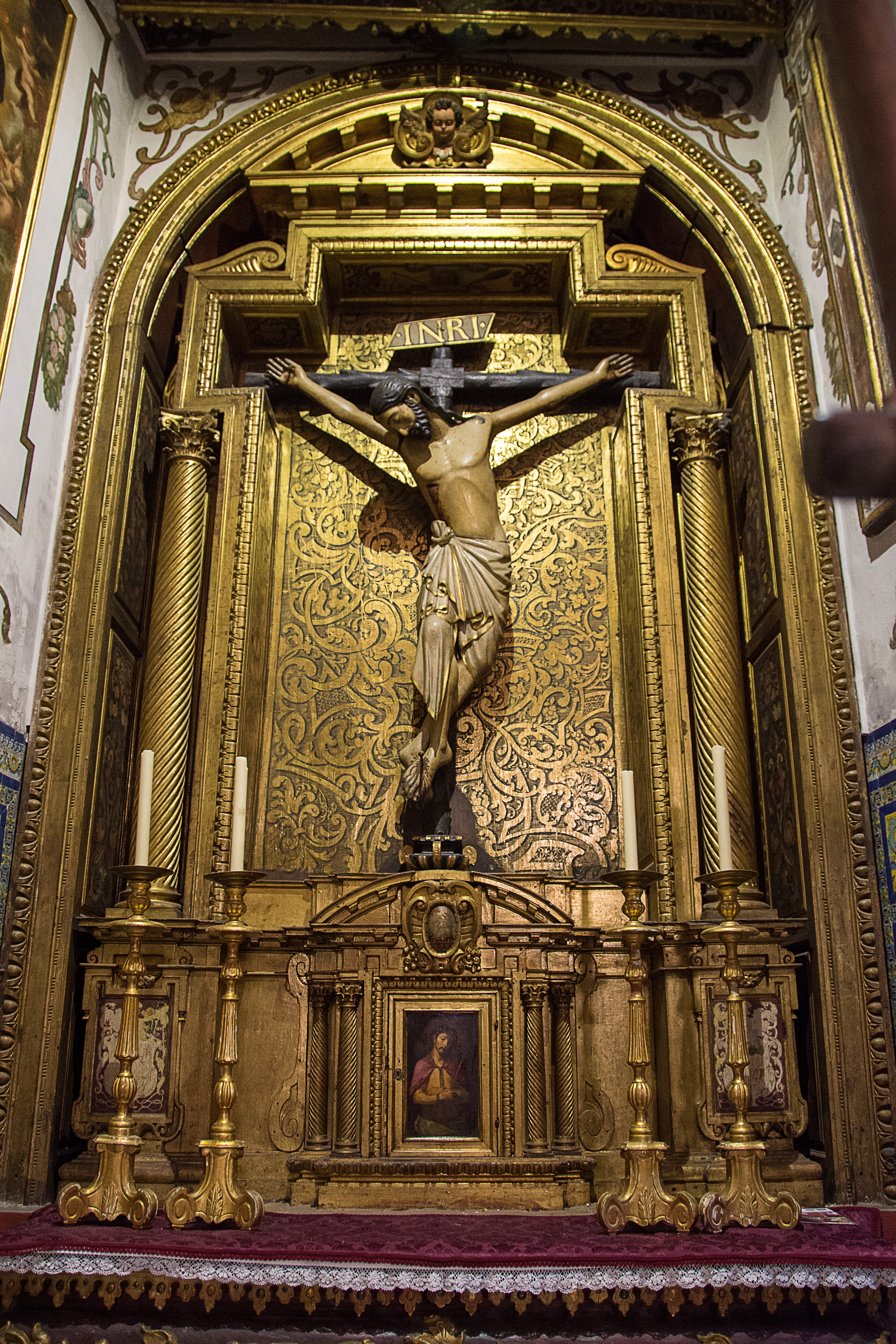 Cristo de la Sangre o de los Maestres, iglesia de San Isidoro de Sevilla. Crucificado gótico del siglo XIV.